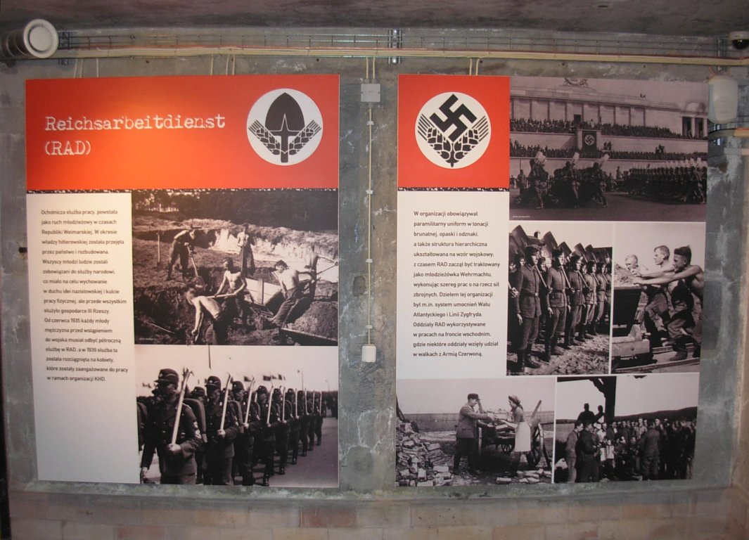 Eksploseum w Bydgoszczy - jedna z wystaw